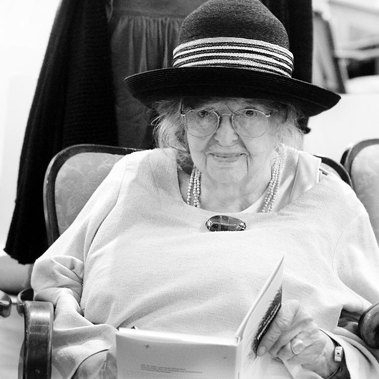 Anne Dorn, Düsseldorf Heine Buchhandlung, 18.September 2014